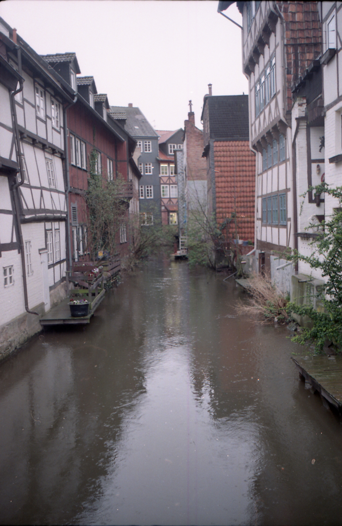 Вольфенбюттель.Канал по типу голландского гракха